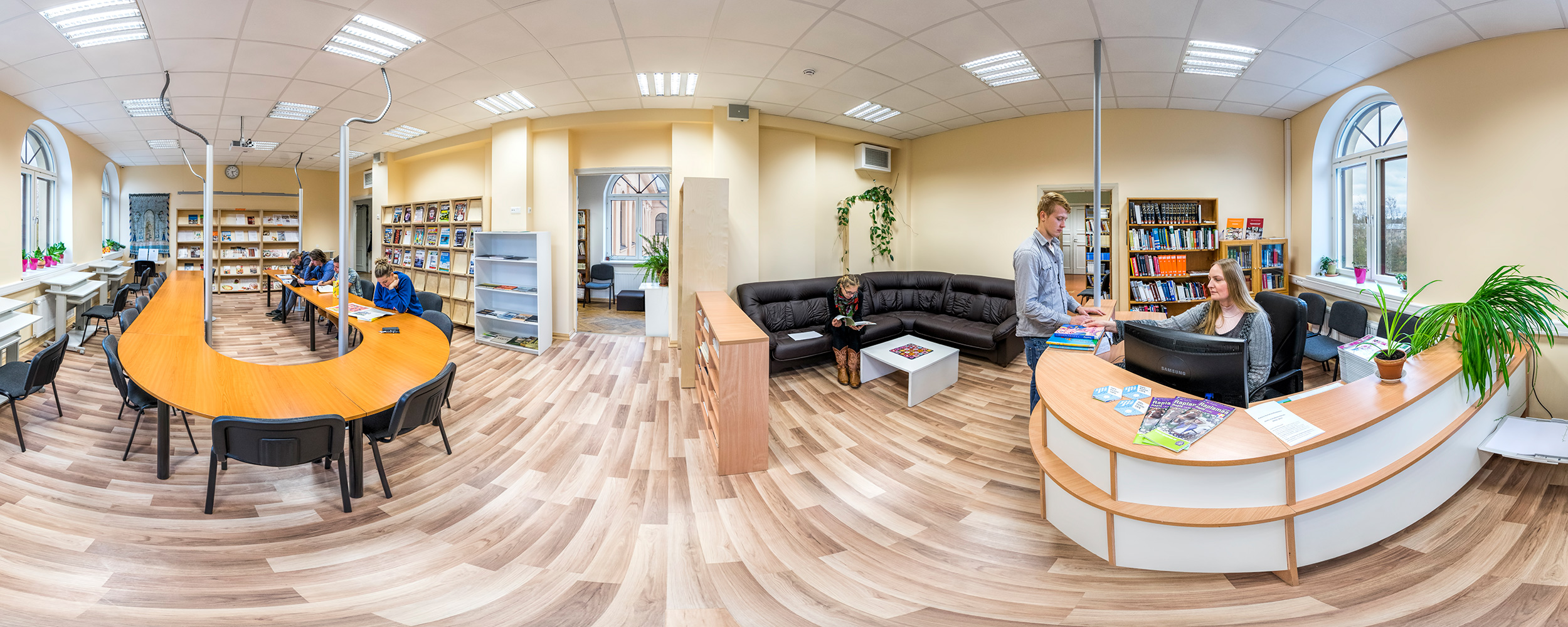 Kehtna Kutsehariduskeskuse raamatukogu